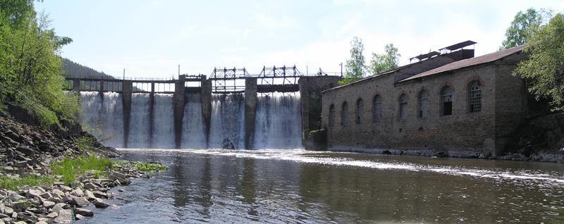 Панорама старейшей ГЭС России «Пороги» (построена к 1909 году)